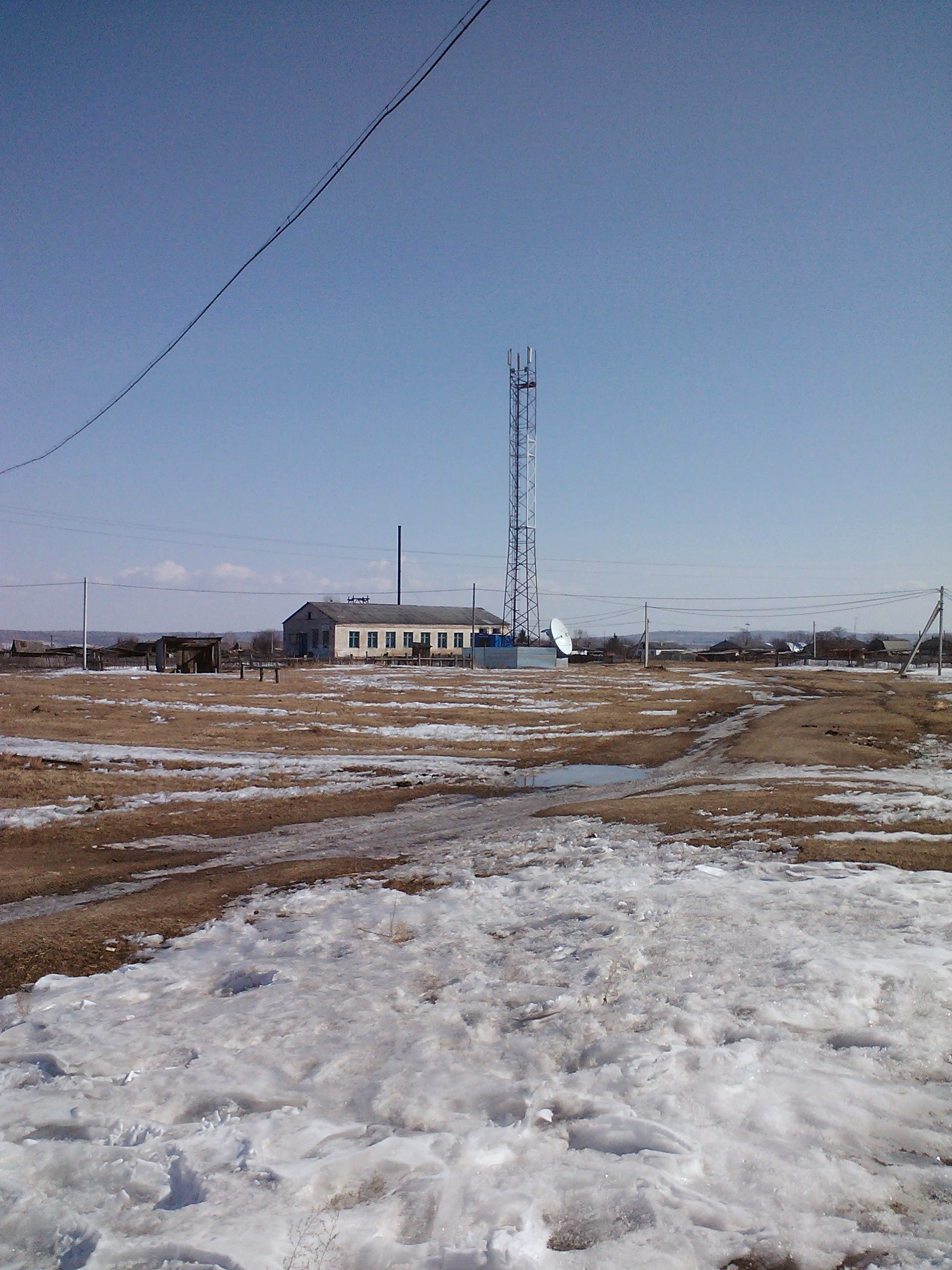 Центральная часть села.